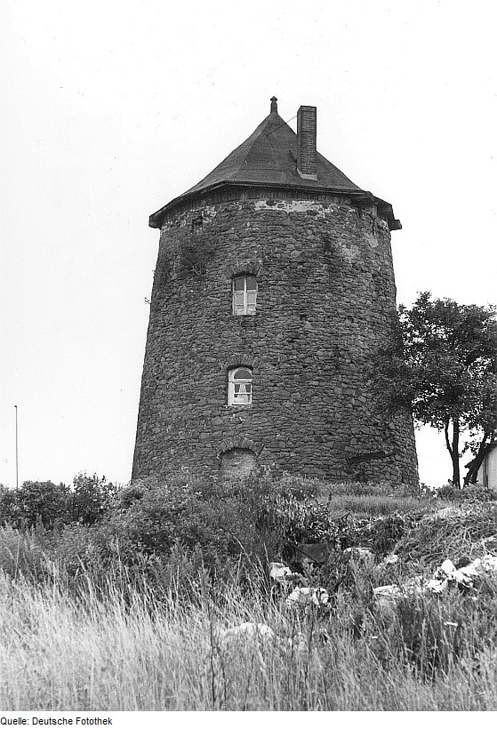 Original image description from the Deutsche Fotothek Magdeburg-Olvenstedt. Düppler Mühle, Turmholländer